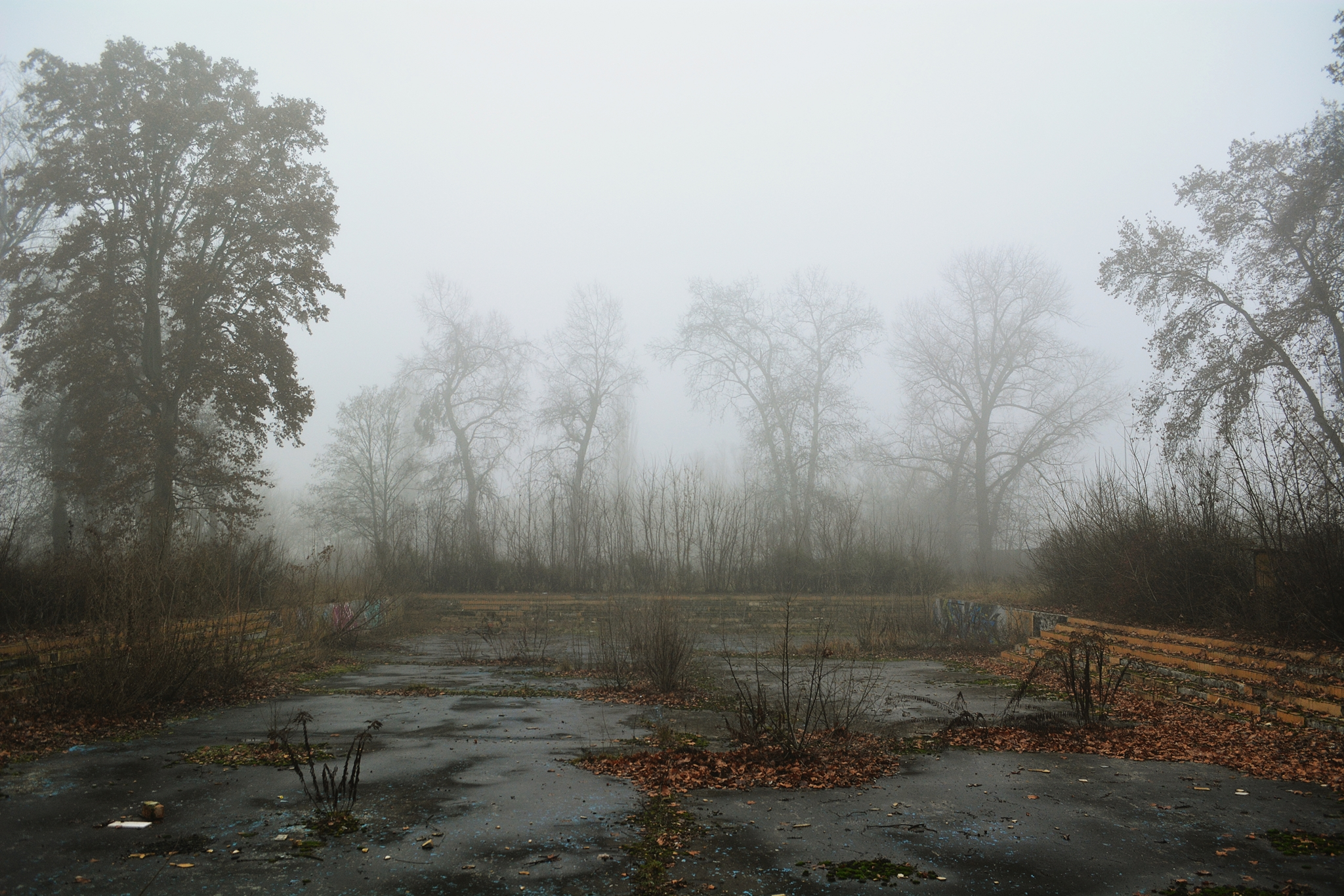 Elhanyagolt strand (Mária strandfürdő) Rákoscsaba-Újtelep déli határában.